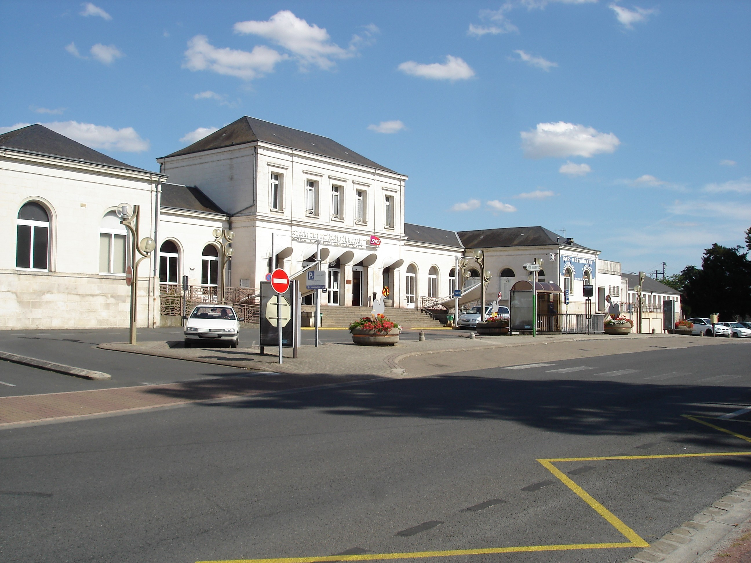 Gare de Châtellerault (86) : Le bâtiment voyageurs.